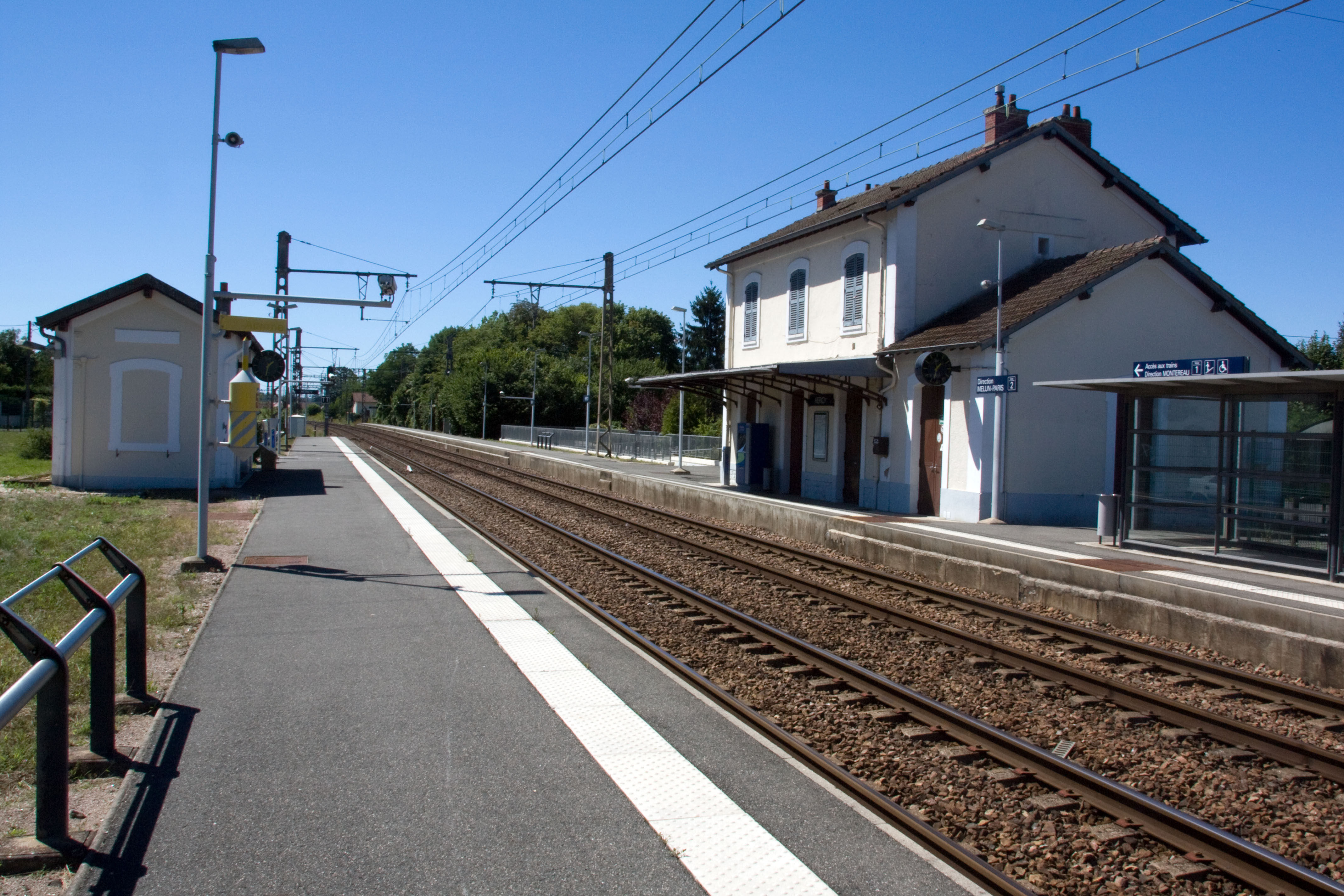 Gare d'Héricy, Héricy, Seine-et-Marne, France